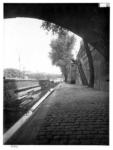 Vue générale